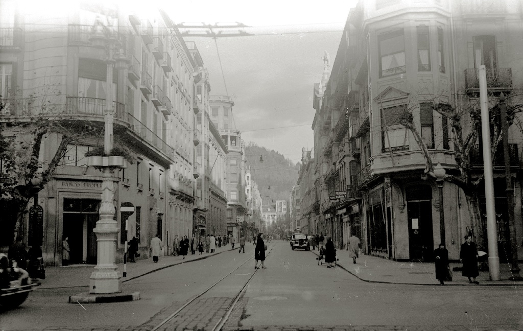 Título original: Vista de la calle Garibai (1/1) Localización: San Sebastián (Guipúzcoa)